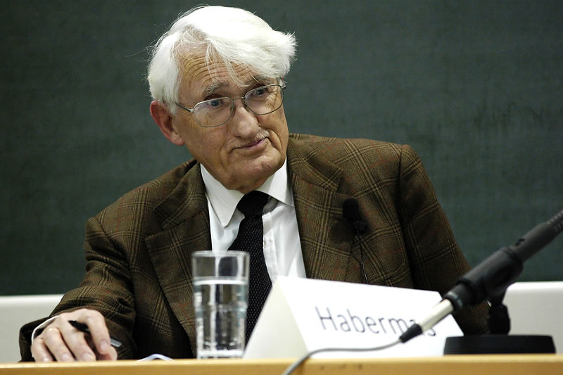 Jurgen Habermas